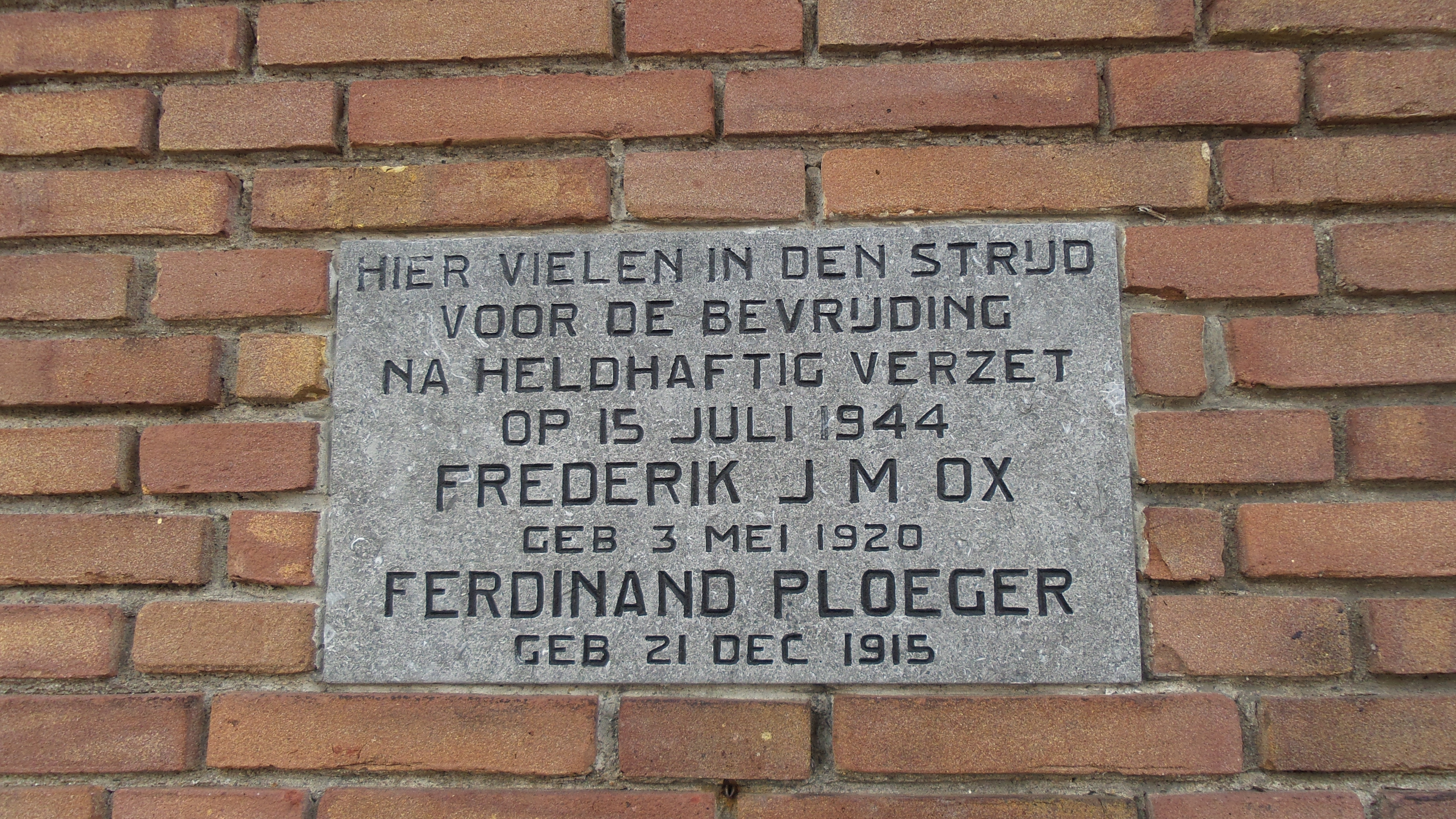 Oorlogsmonument in de vorm van een ingemetselde plaquette van hardsteen voor Frederik J.M. Ox en Ferdinand Ploeger in de Gerrit van der Veenstraat te Amsterdam